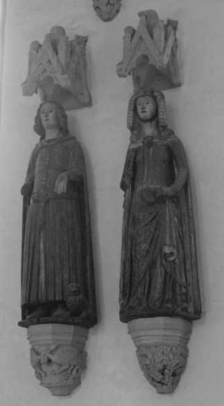 Otto der Milde und Agnes von Branderburg